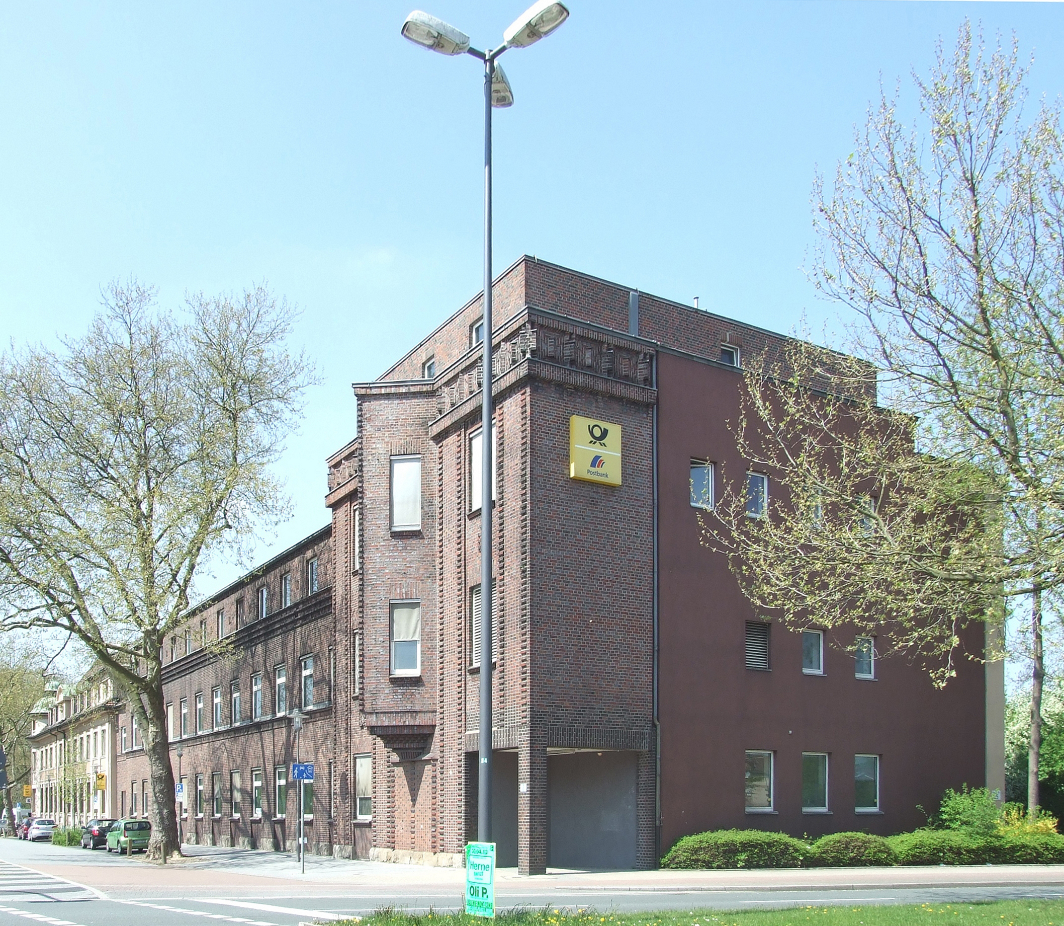 Herne, Paket- und Telegrafenamt